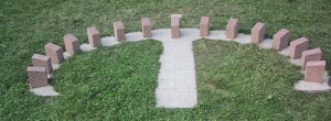 cadran solaire analemmatique (45,45° N) à Saint-Etienne, Loire France